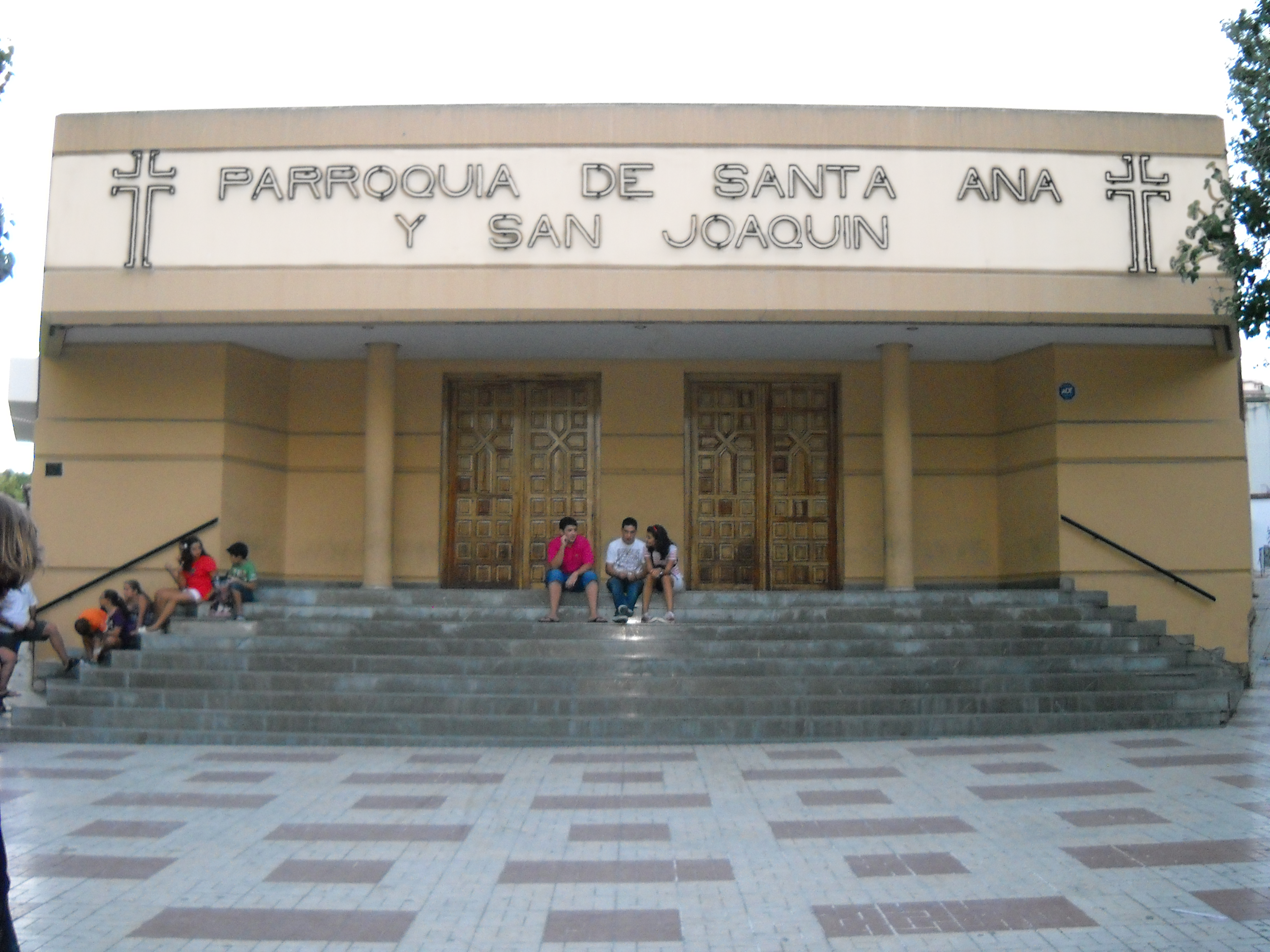 Iglesia de Santa Ana y San Joaquín, Málaga, España.